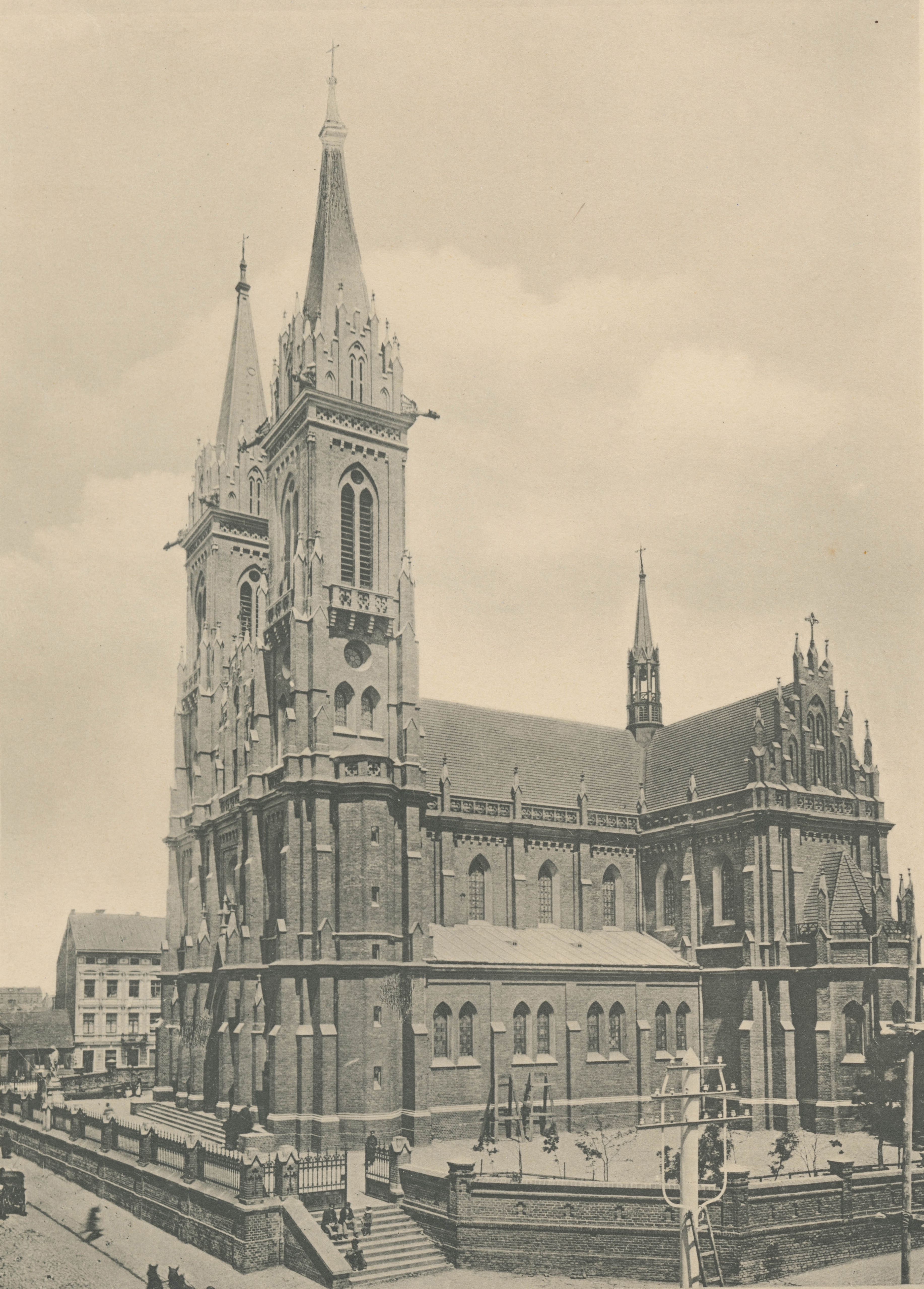 Fotografia Bronisława Wilkoszewskiego z albumu „Widoki m. Łodzi” przedstawiająca kościół rzymskokatolicki Wniebowzięcia Najświętszej Marii Panny na Starym Mieście (widok od strony południowej). Przed 1888 rokiem na Placu Kościelnym stał drewniany kościół parafialny pod tym samym wezwaniem. Rozebrany i przeniesiony w 1888 roku na ul. Ogrodową 22, gdzie został poświęcony jako kościół pw. św. Józefa Oblubieńca Najświętszej Maryi Panny. Decyzję o budowie nowej świątyni podjęto w latach 80. XIX wieku, a projekt w stylu gotyku wiślano-bałtyckiego wykonał warszawski architekt Konstanty Wojciechowski. Budowa rozpoczęła się w 1888 roku, by już w dwa lata później świątynia była gotowa w stanie surowym. Wykończenia trwały do 1897 roku i dopiero wówczas dokonano jej konsekracji. Jak w przypadku świątyń innych wyznań i tu w komitecie budowy zasiadali miejscowi przemysłowcy różnych wyznań m.in.: Juliusz Kunitzer, rodzina Scheiblerów oraz Izrael Kalmanowicz Poznański.